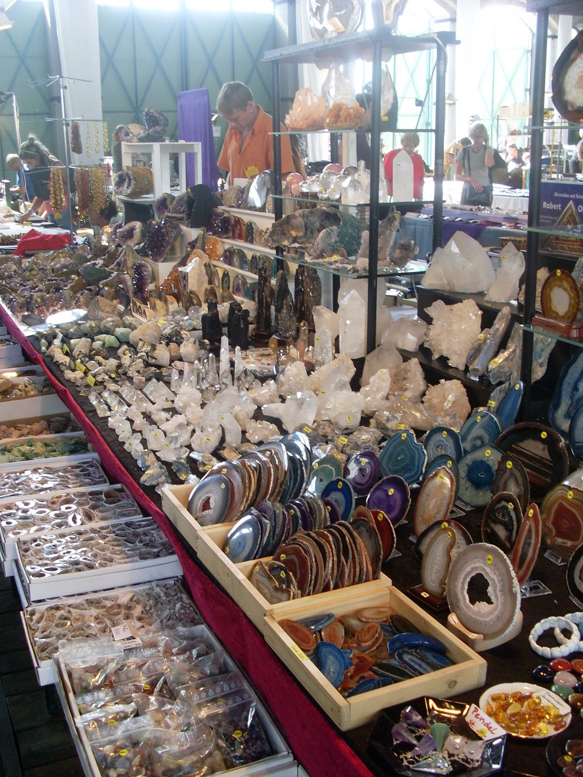 Mineralenbeurs in het Vasúttörténeti Park.